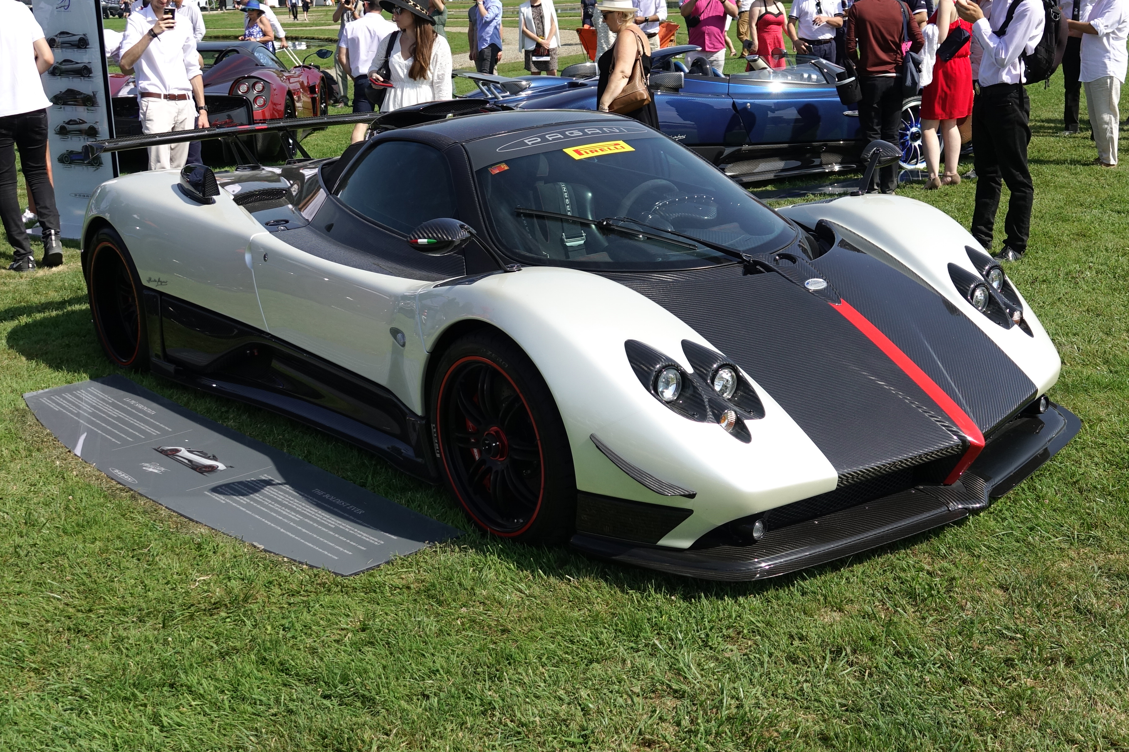 Pagani Zonda Cinque au Chantilly Arts & Elegance Richard Mille 2019